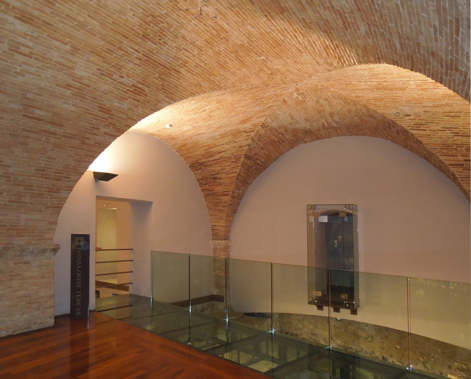 Volte in laterizi all'interno della Casa dei Melatino in Teramo, attuale sede delle Fondazione TERCAS. Immagine scattata in occasione della Notte dei Musei 2016.